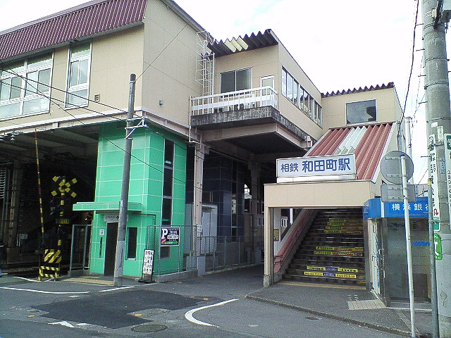 Wadamachi Station, Sotetsu Line, Hodogaya-ku, Yokohama, Kanagawa, Japan